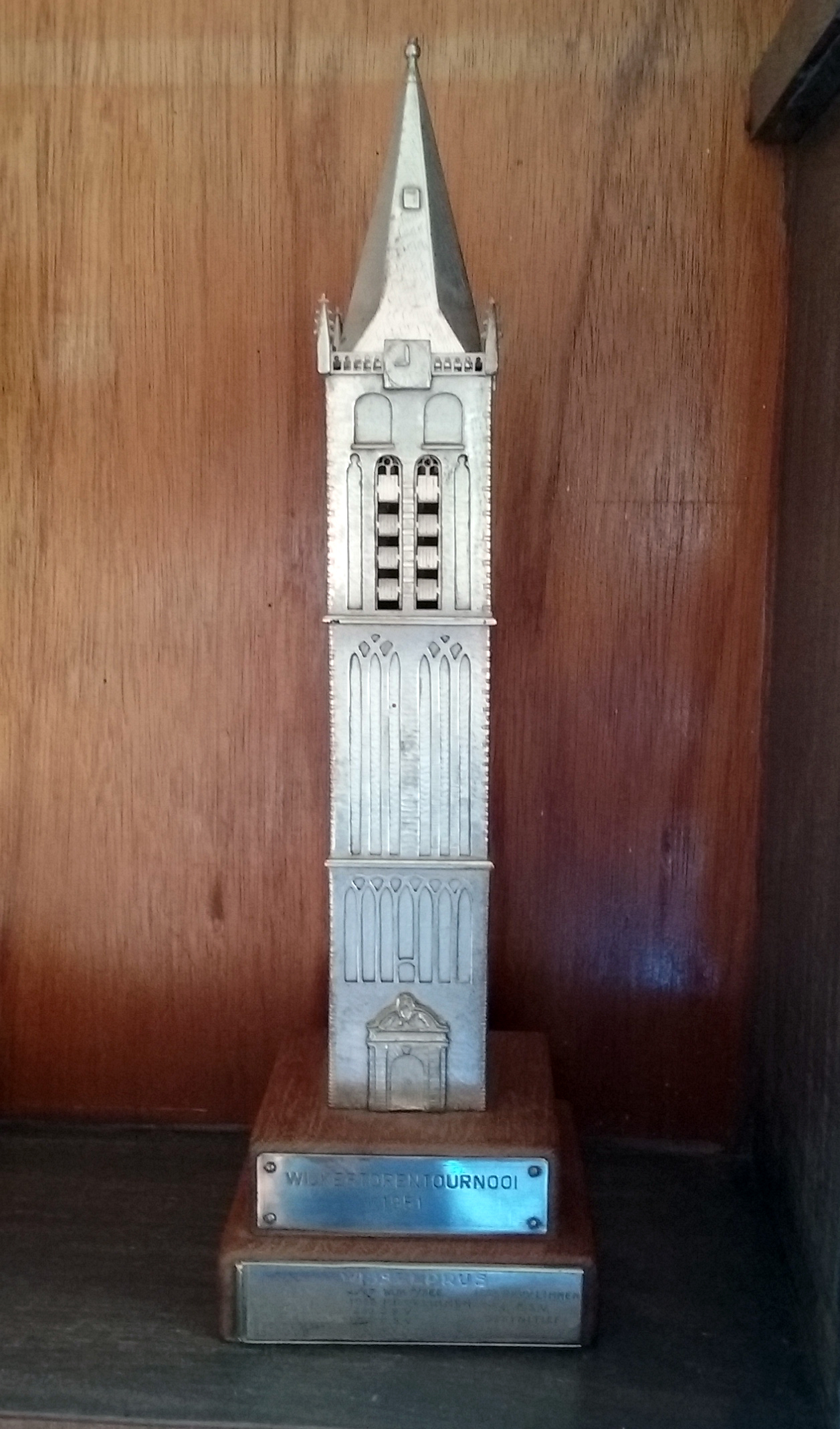 De trofee van het Wijkertorentoernooi in de prijzenkast van FC Castricum.